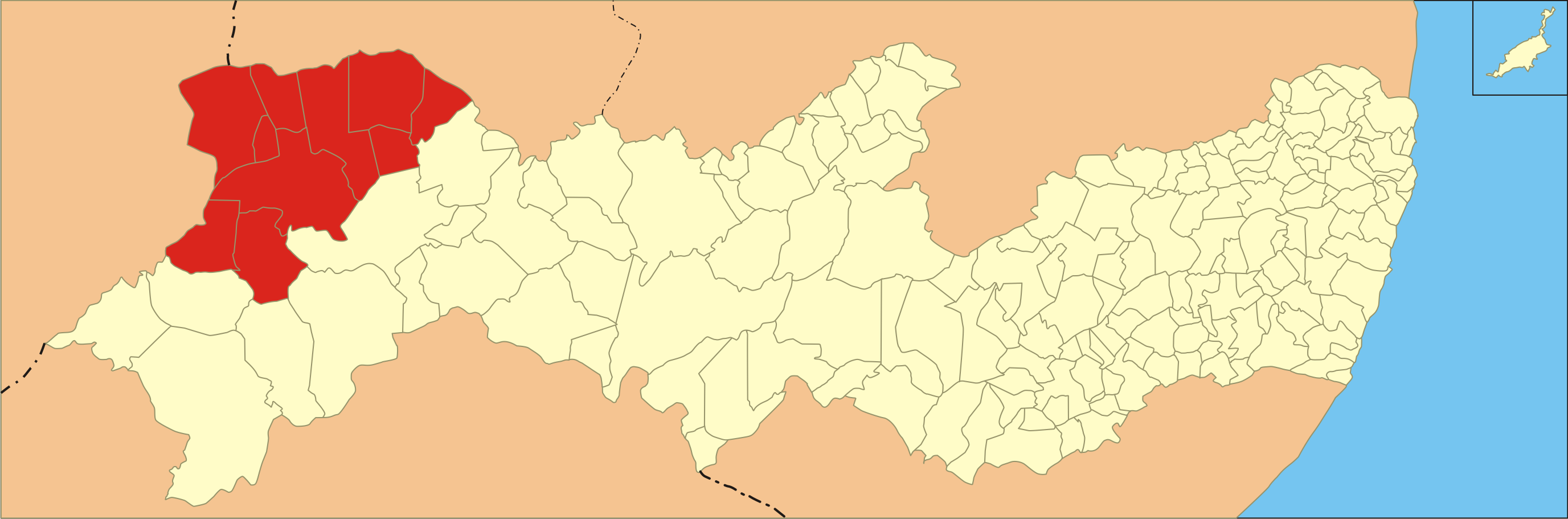 Localização da microrregião no estado de Pernambuco.